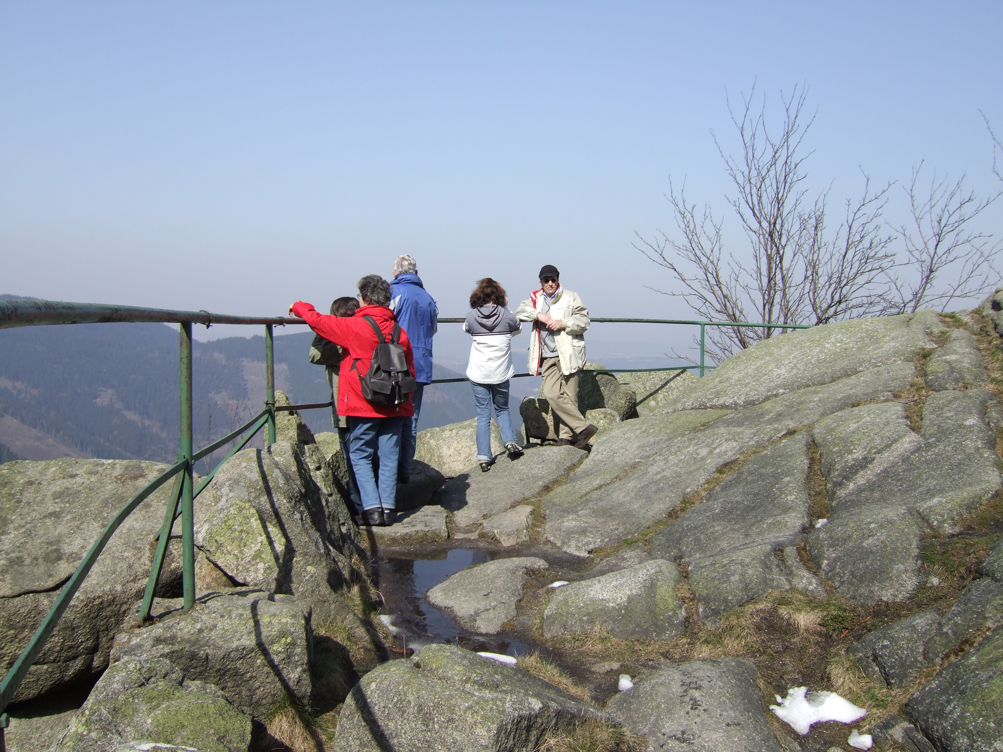 Aussichtplatform auf den Kästeklippen